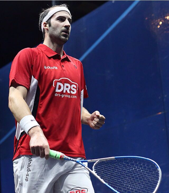 Simon Rösner, deutscher Squashspieler